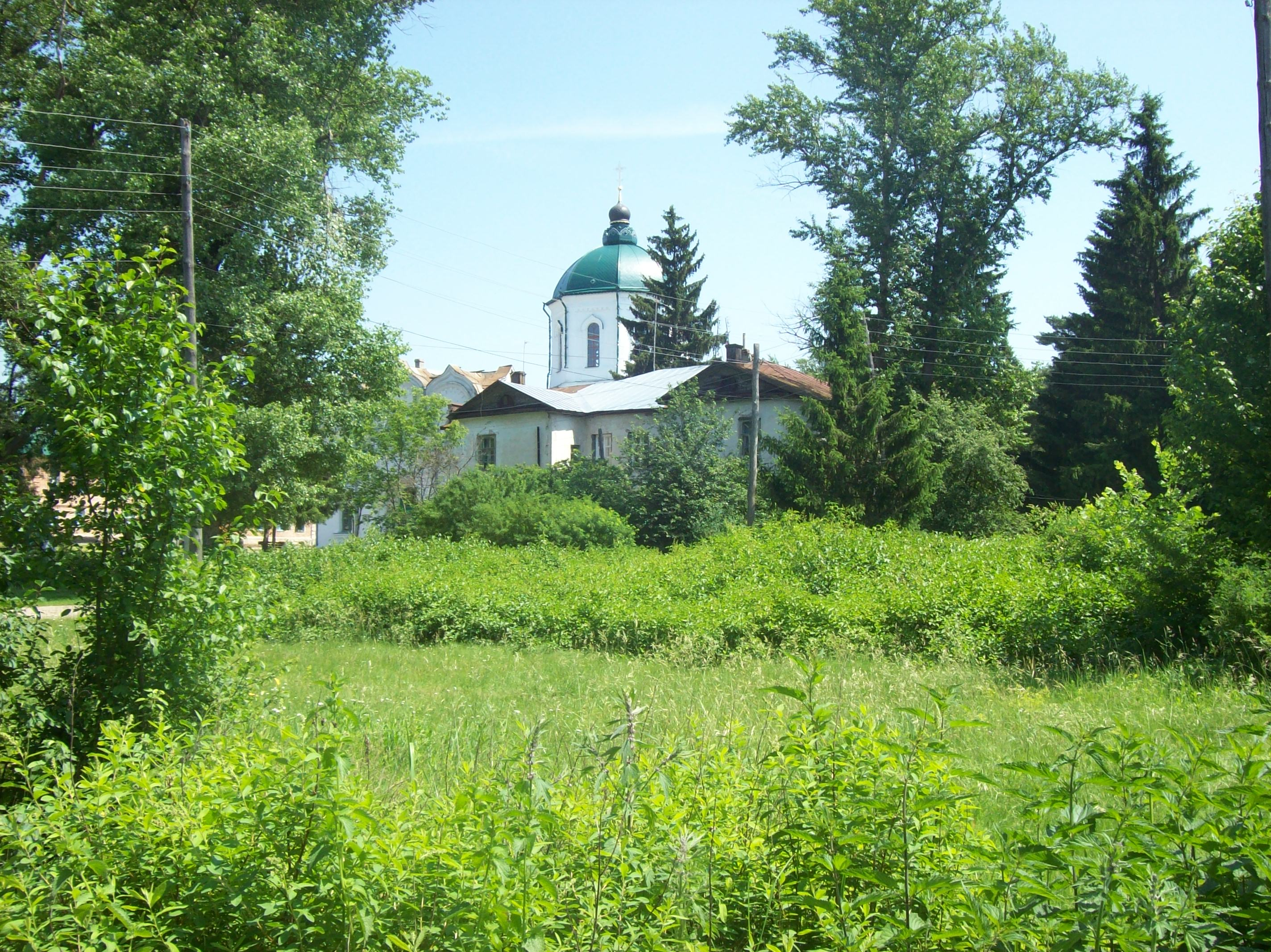 Воронежская область. Вид на Толшевкий монастырь